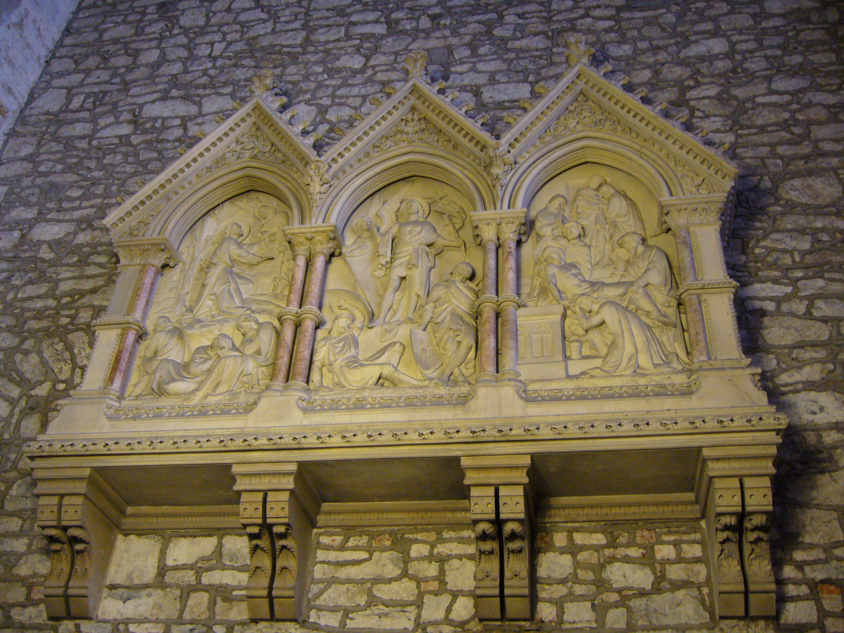 Retable de Westropp dans la cathédrale de Sainte-Marie de Limerick